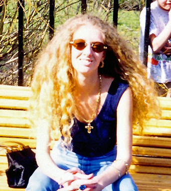 Российская певица и музыкант, участница группы «Лицей» Изольда Эдвардовна Ишханишвили.